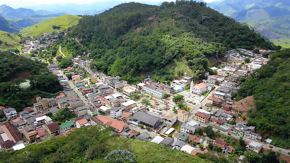 São Sebastião do Alto vista aerea